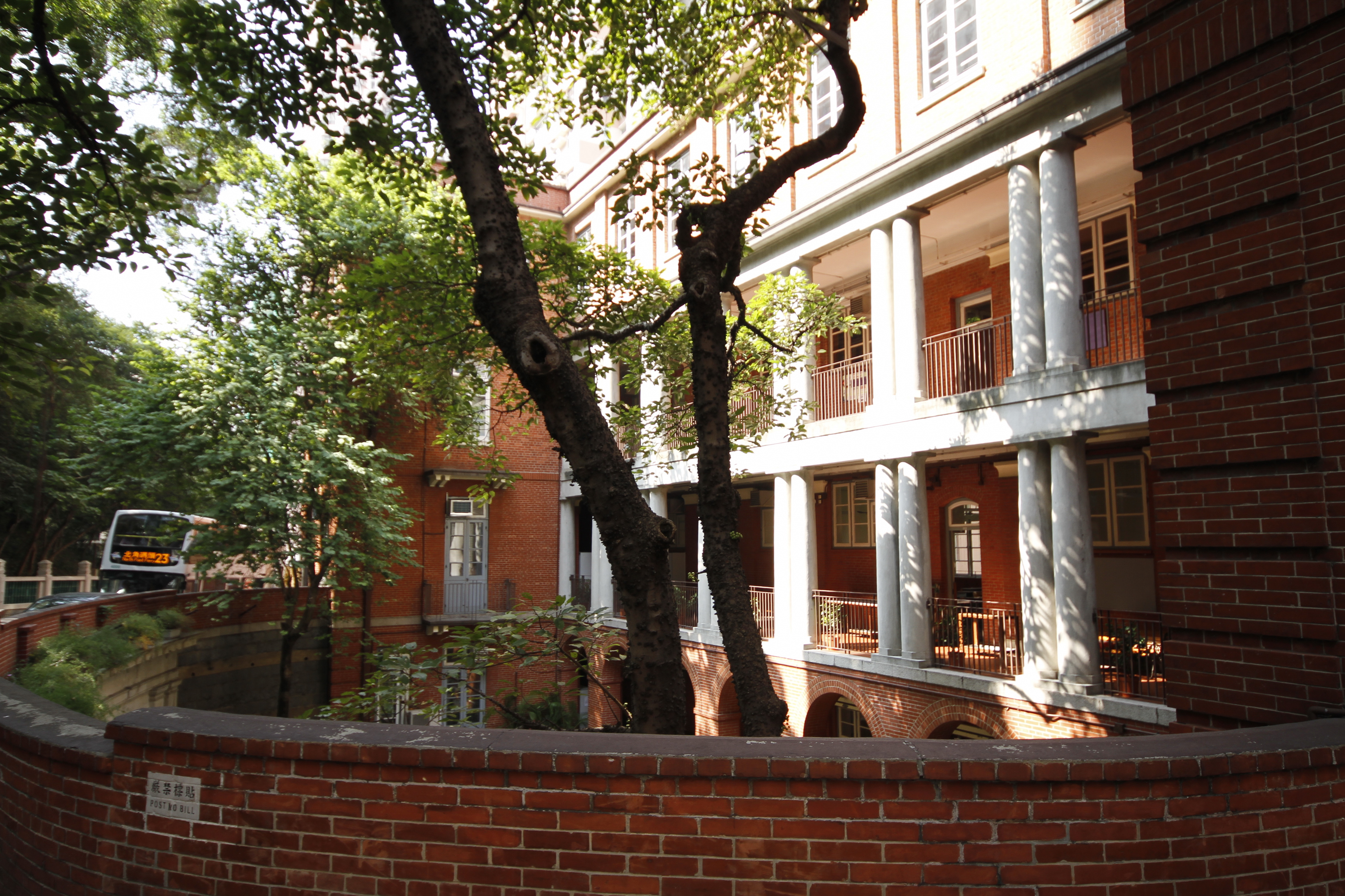 英皇書院